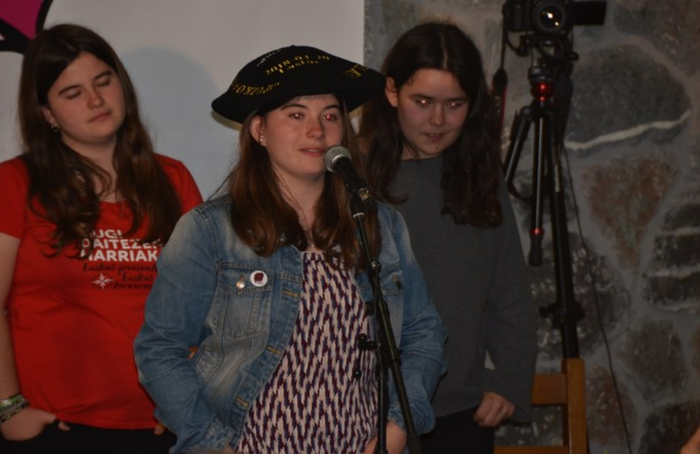 Oihana Arana Cardenal